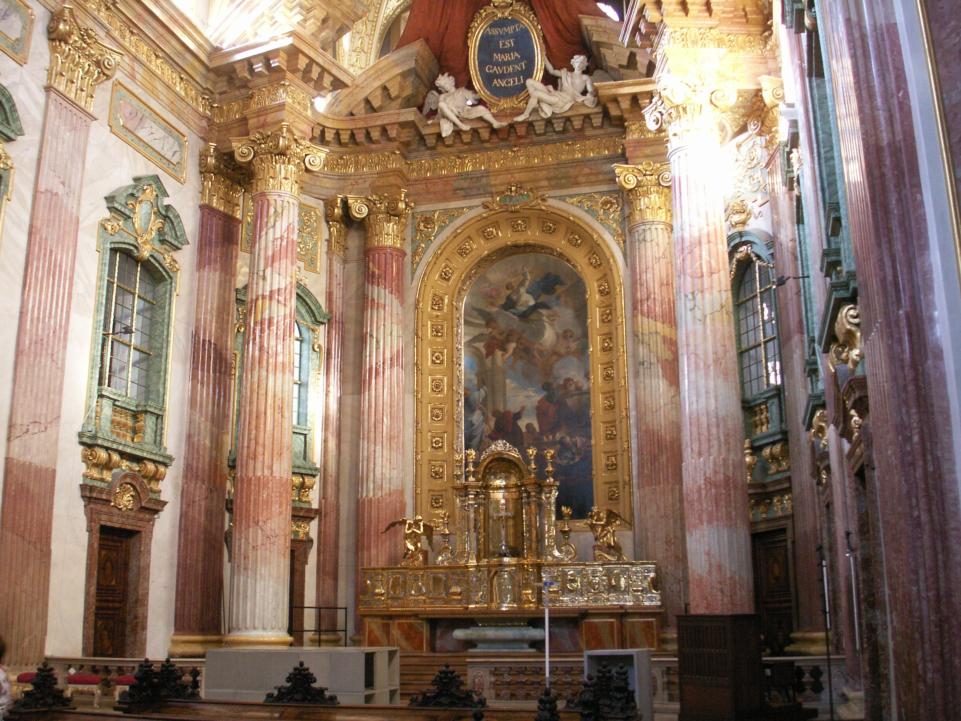 Jesuitenkirche, Wien, Altar